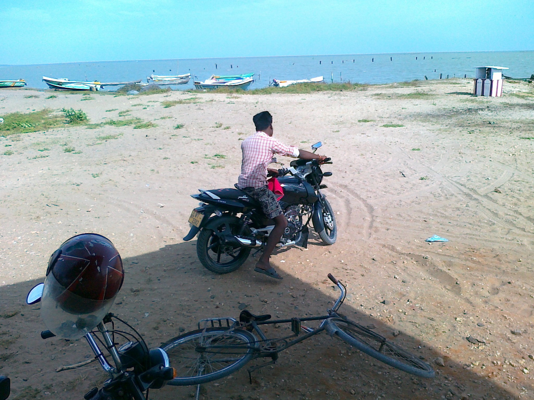 கச்சாய் துறைமுகம்